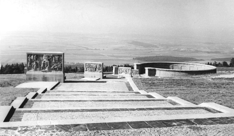 Gedenkstätte Buchenwald, Ringgrab 1, Stelenweg Zentralbild Wittig 29.8.1958 Bauarbeiten für die Mahn- und Gedenkstätte Buchenwald im wesentlichen abgeschlossen Die 1954 begonnenen Bauarbeiten für die monumentale Mahn- und Gedenkstätte Buchenwald am Südhang des Ettersberges bei Weimar, die am 14. September unter großer internationaler Beteiligung feierlich eingweiht wird, sind im wesentlichen abgeschlossen. Vor dem 50 Meter hohen Turm wird jetzt unter persönlicher Anleitung des Bildhauers Prof. Fritz Cremer, das von ihm geschaffene Buchenwalddenkmal aufgestellt. (Siehe auch ADN-Meldung Nr. 66 vom 28.8.58 der Bezirksstelle Erfurt) UBz: Blick auf den Stelenweg